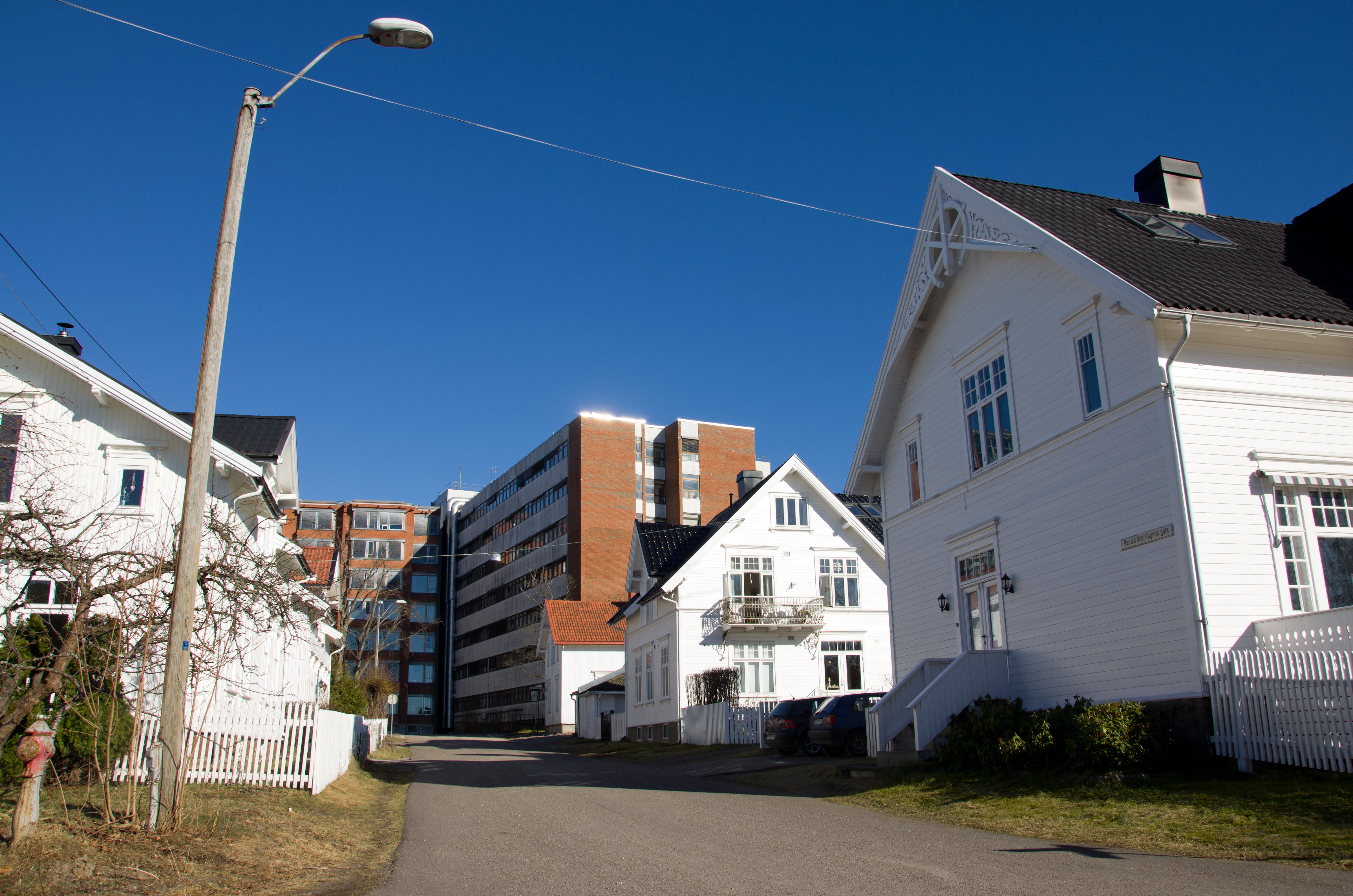 Harald Hårfagres gate, Tønsberg